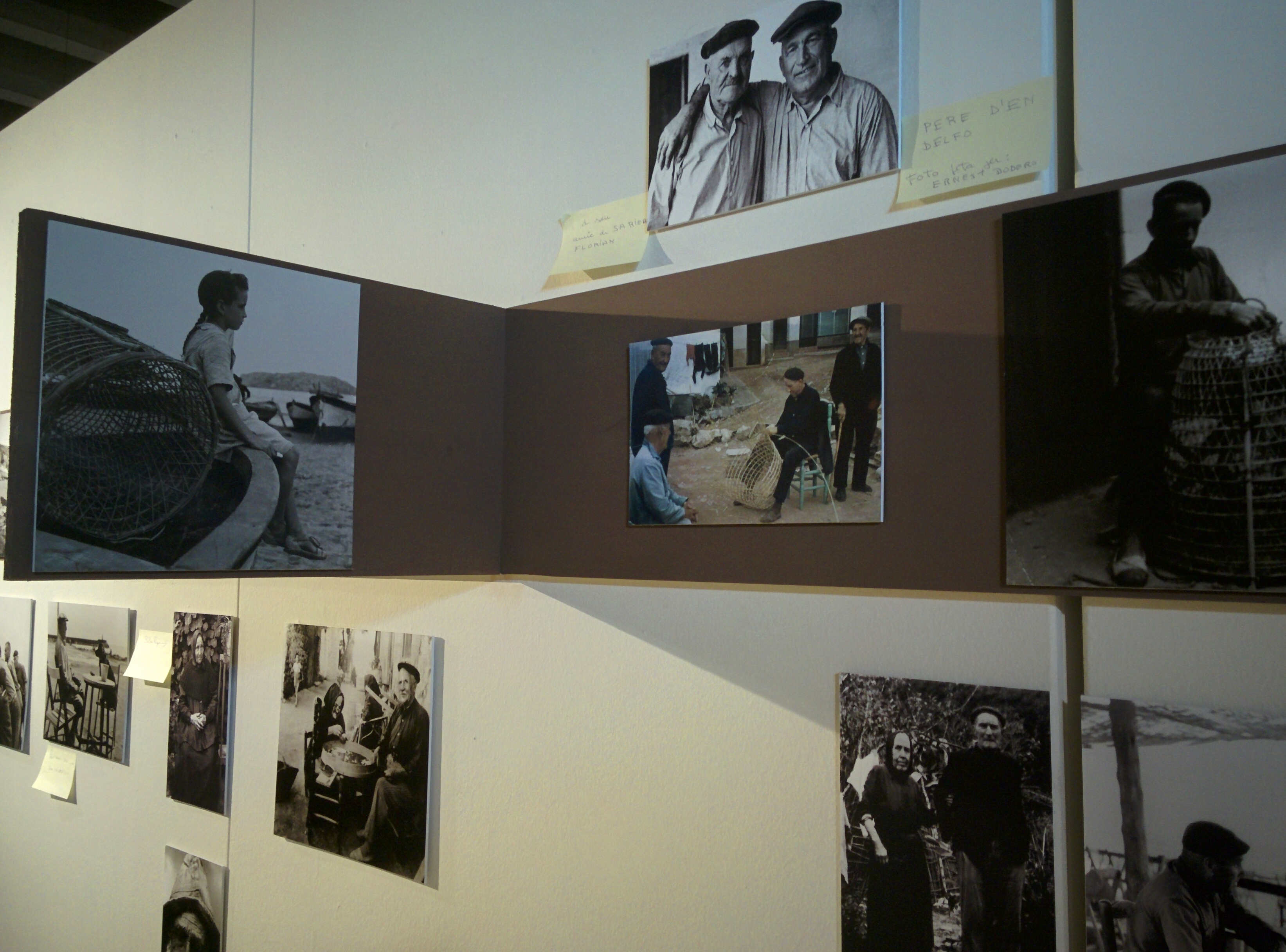 Detall exposició imatges inesborrables Can Quintana